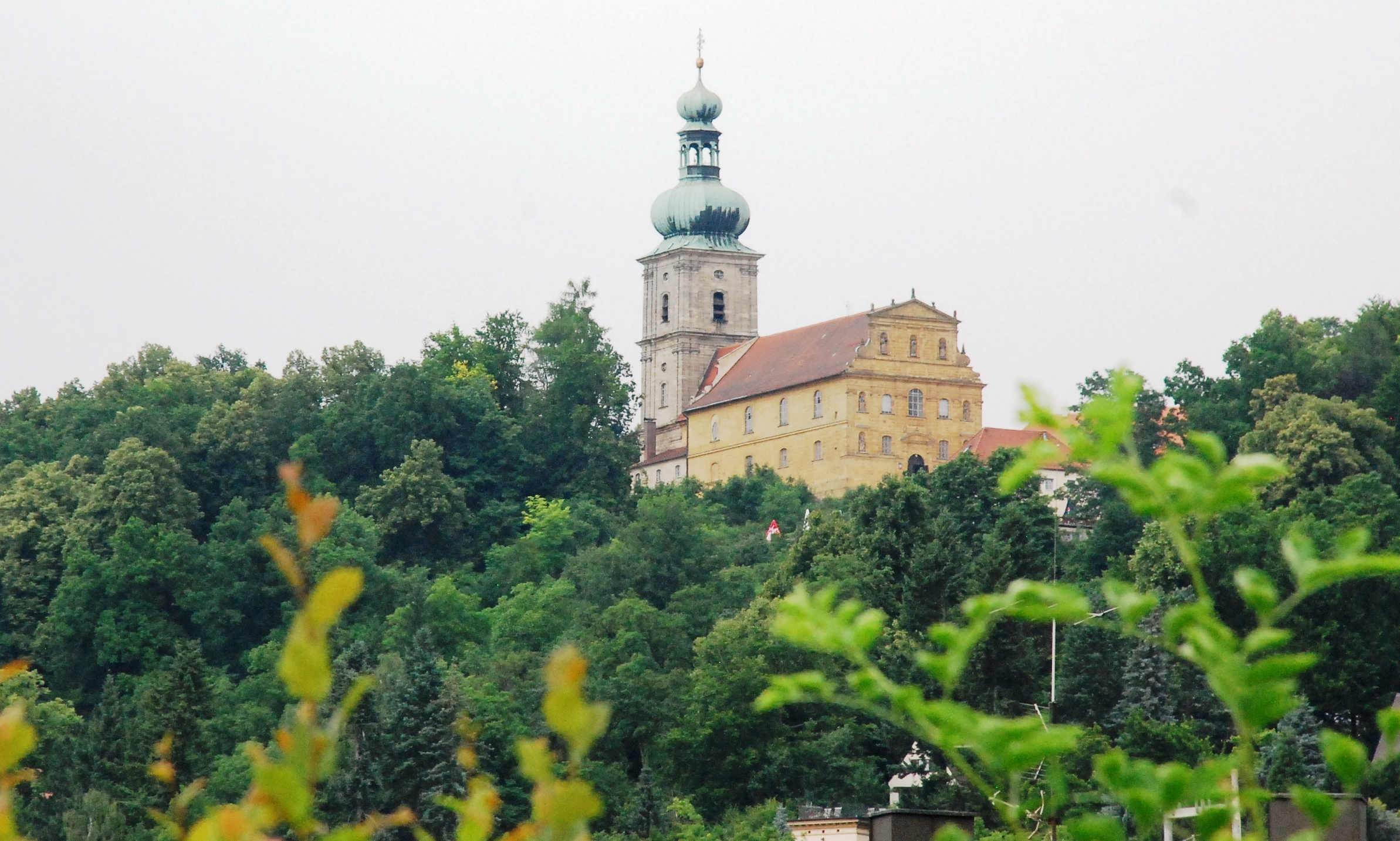 Bergkirche Amberg-Bavière EXTERIEUR depuis Amberg